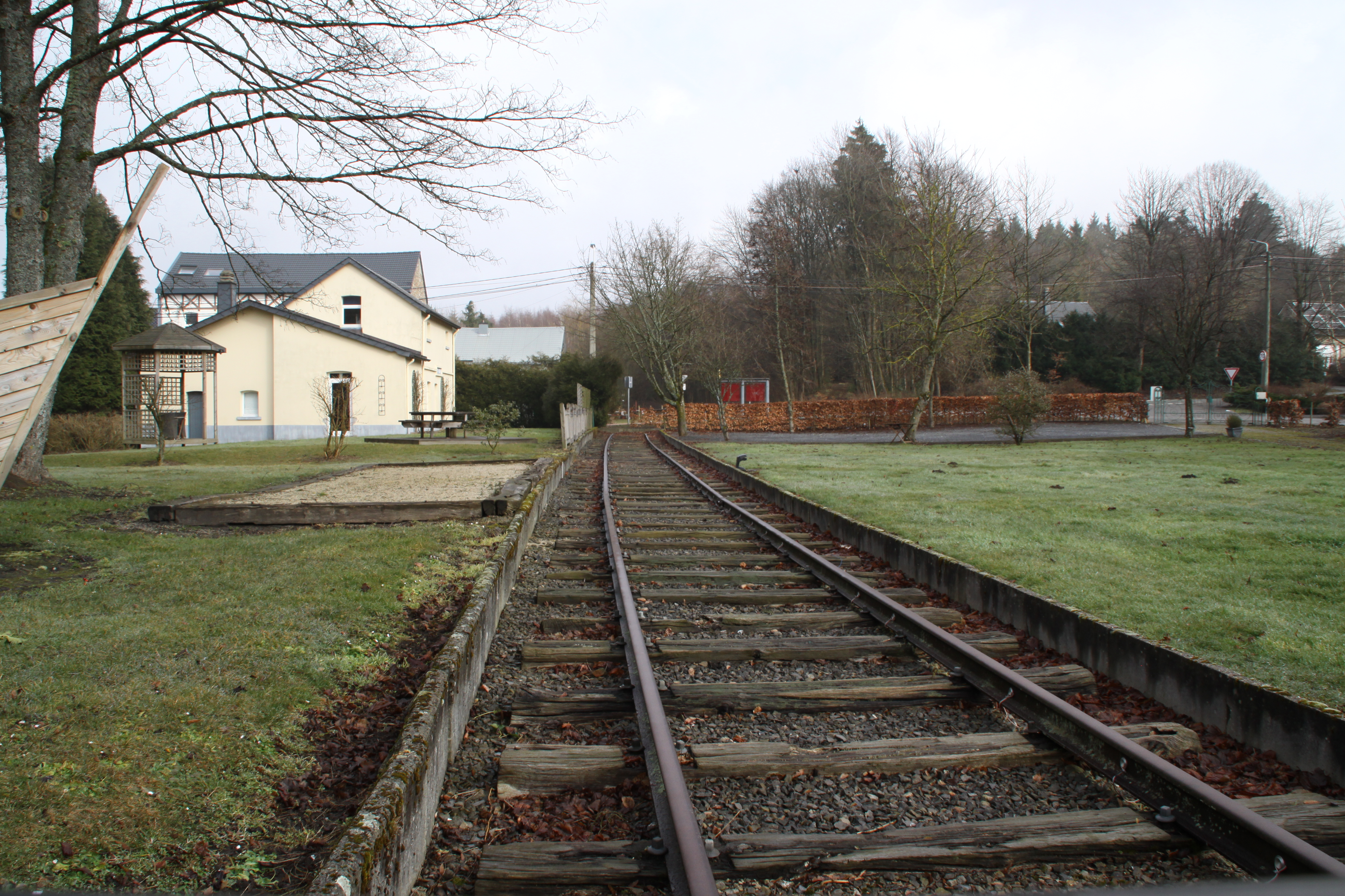 Gleis an der Gare vu Sart